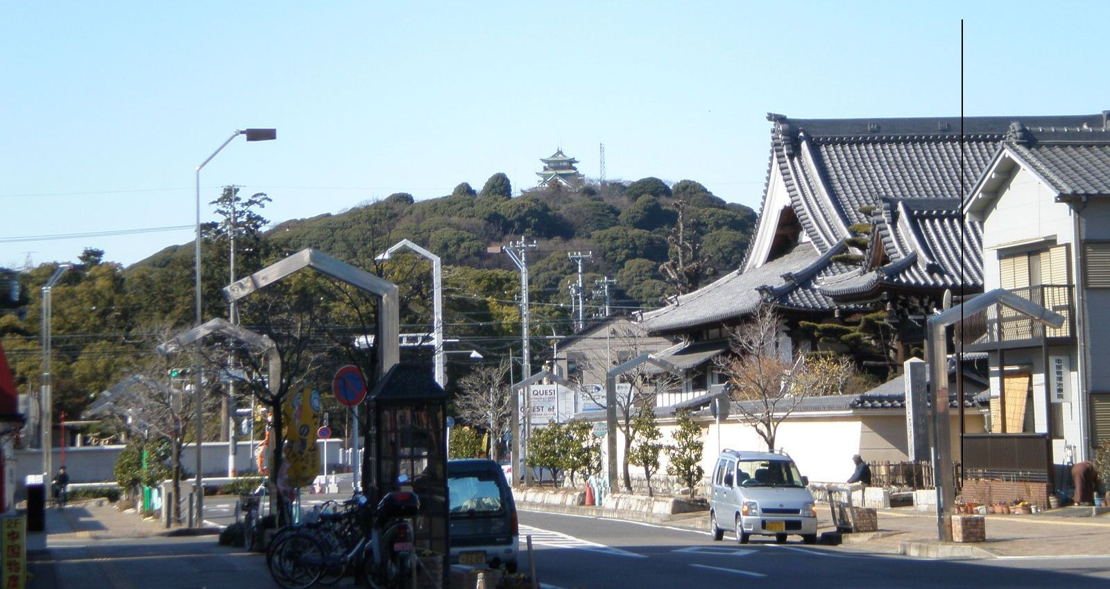 愛知県小牧市にある小牧山を小牧市中心市街地から望む（撮影場所：小牧市小牧4丁目）